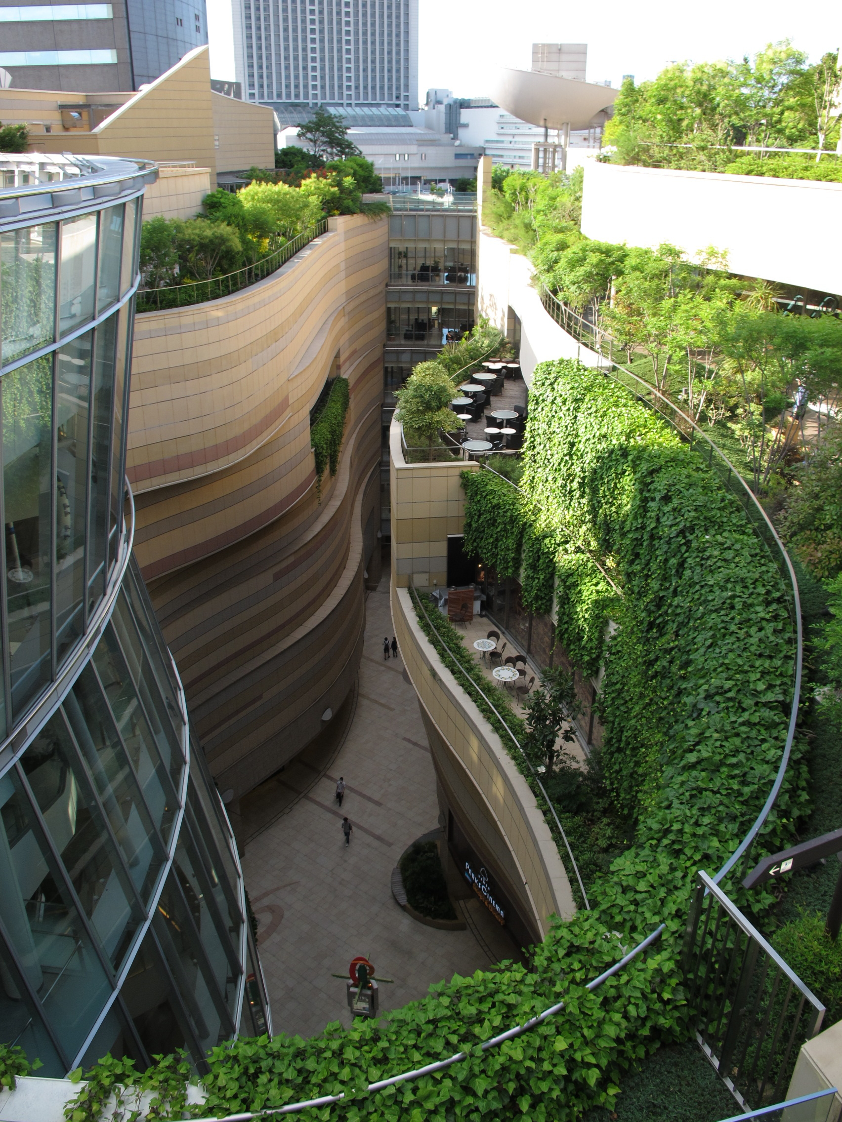 Namba Parks